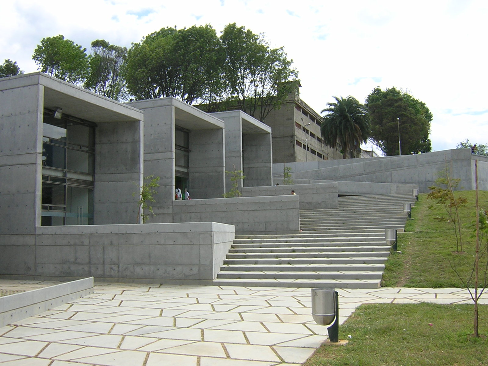 Biblioteca San Javier, Medellín, Colombia